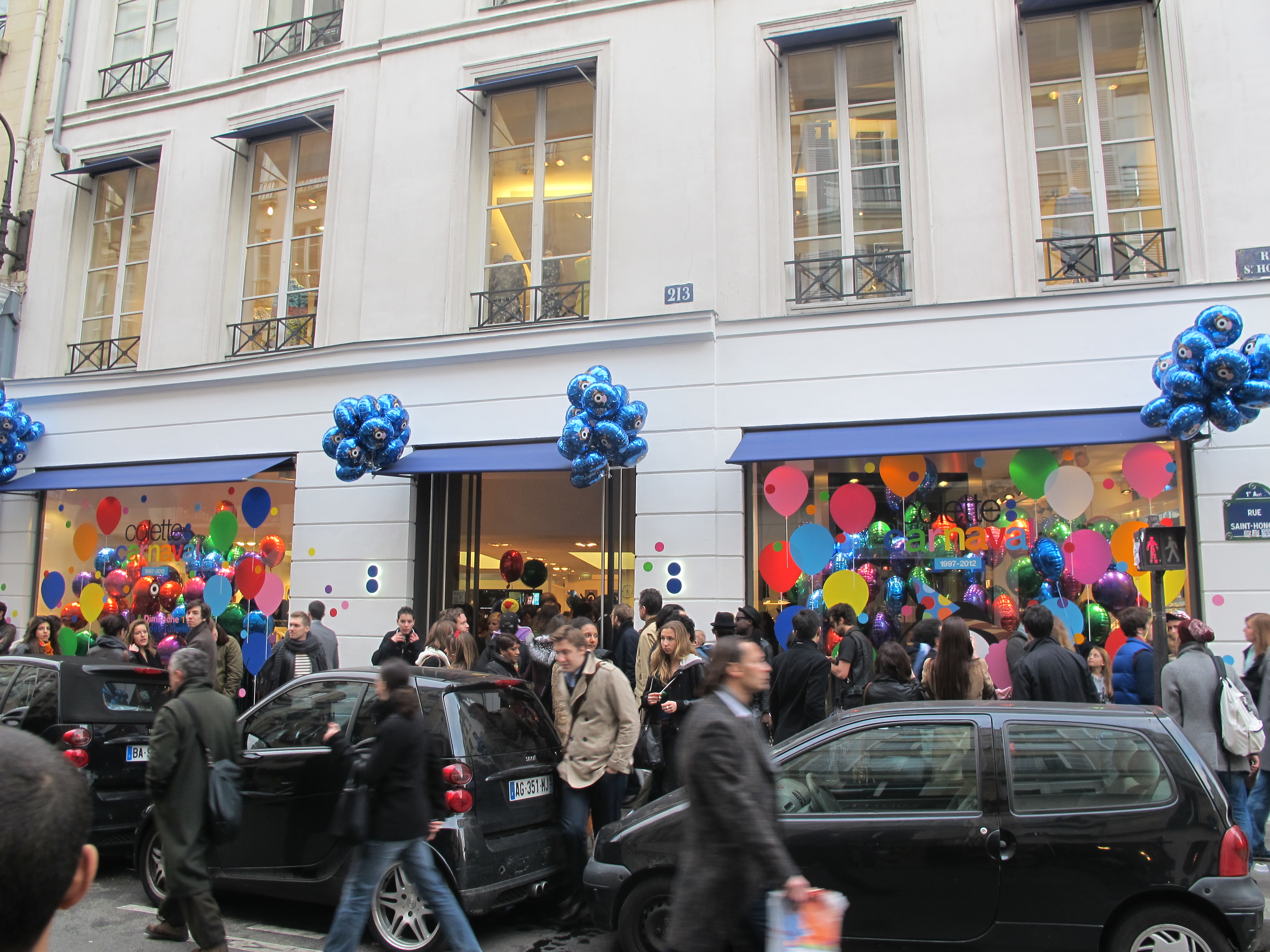 Façade du magasin Colette.